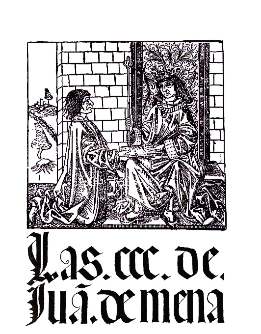 Portada de una edición de hacia 1496 de Las Trescientas, de Juan de Mena, que aparece ofreciendo a Juan II su Laberinto de Fortuna